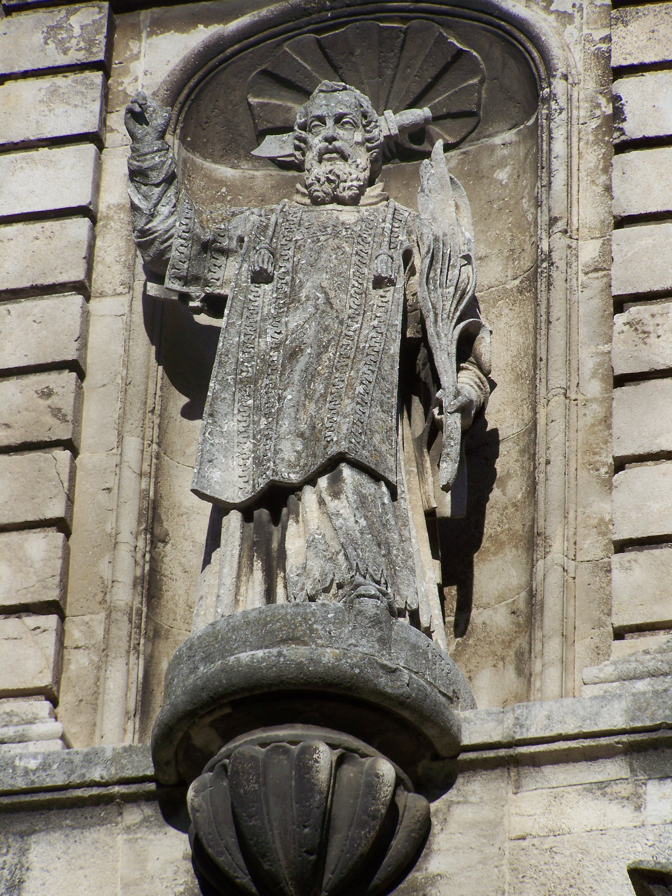 Statue de St Andéol en façade de l'Eglise St Andéol de Bourg Saint Andéol (07-France)